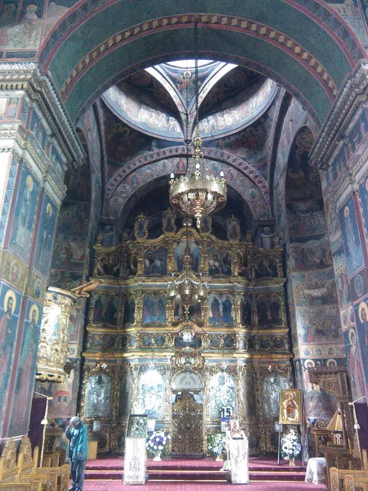 Catedrala episcopală „Sf. Paraschiva”, pictură interioară 01